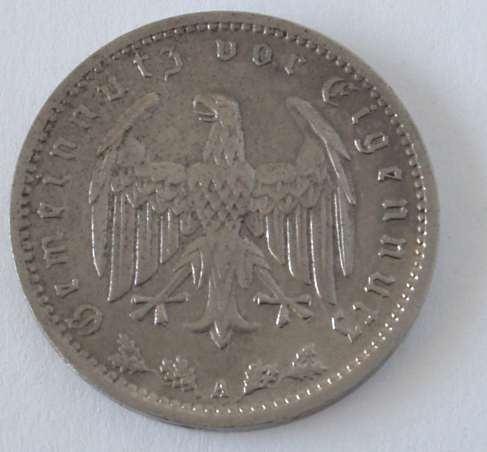 Deutsches Reich, 1 Reichsmark, 1937, back, d=23 mm, 4.8 gramm, ni. Prägestätte A (=Berlin). Umschrift: Gemeinnutz vor Eigennutz.